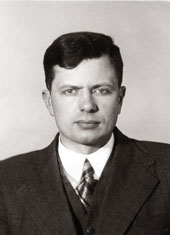 ПОДЦЕРОБ Борис Фёдорович, Посол СССР в Австрии 30.06.1965-20.09.1971